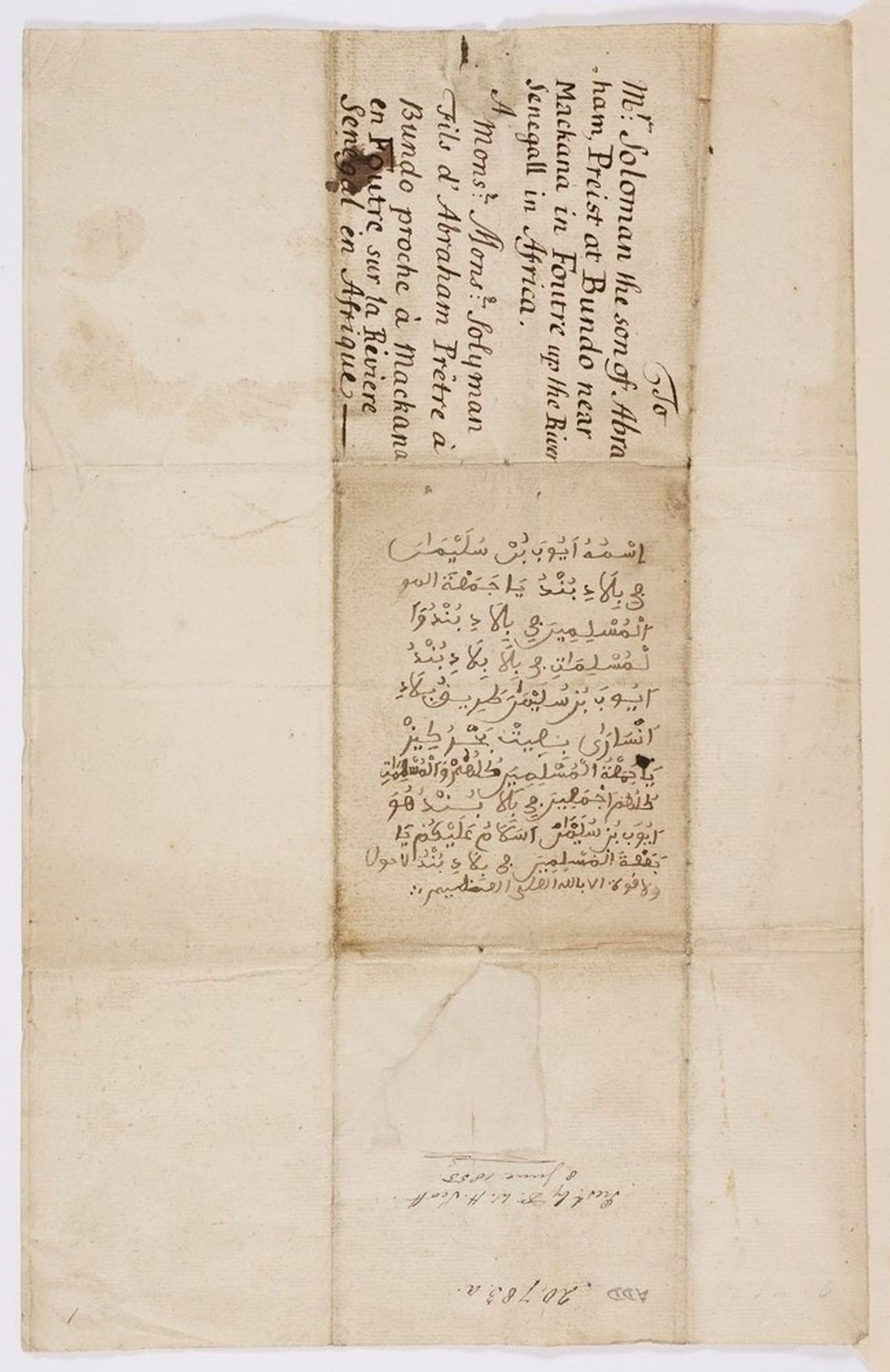 "Il n'y a rien de bon dans les pays des chrétiens pour un musulman" écrit dans cette lettre Ayouba Suleiman Diallo, négrier réduit en esclavage en Amérique et racheté par sa famille